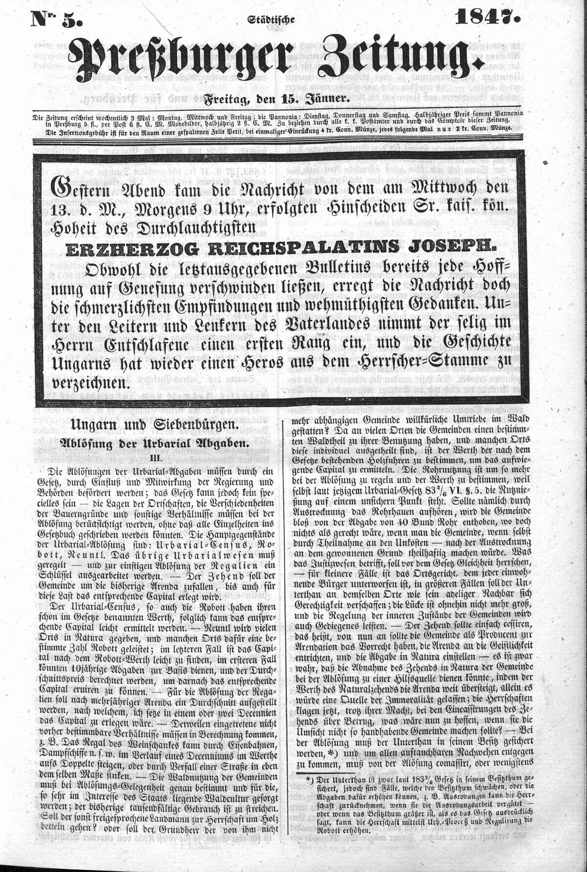 Preßburger Zeitung vom 13. Januar 1847